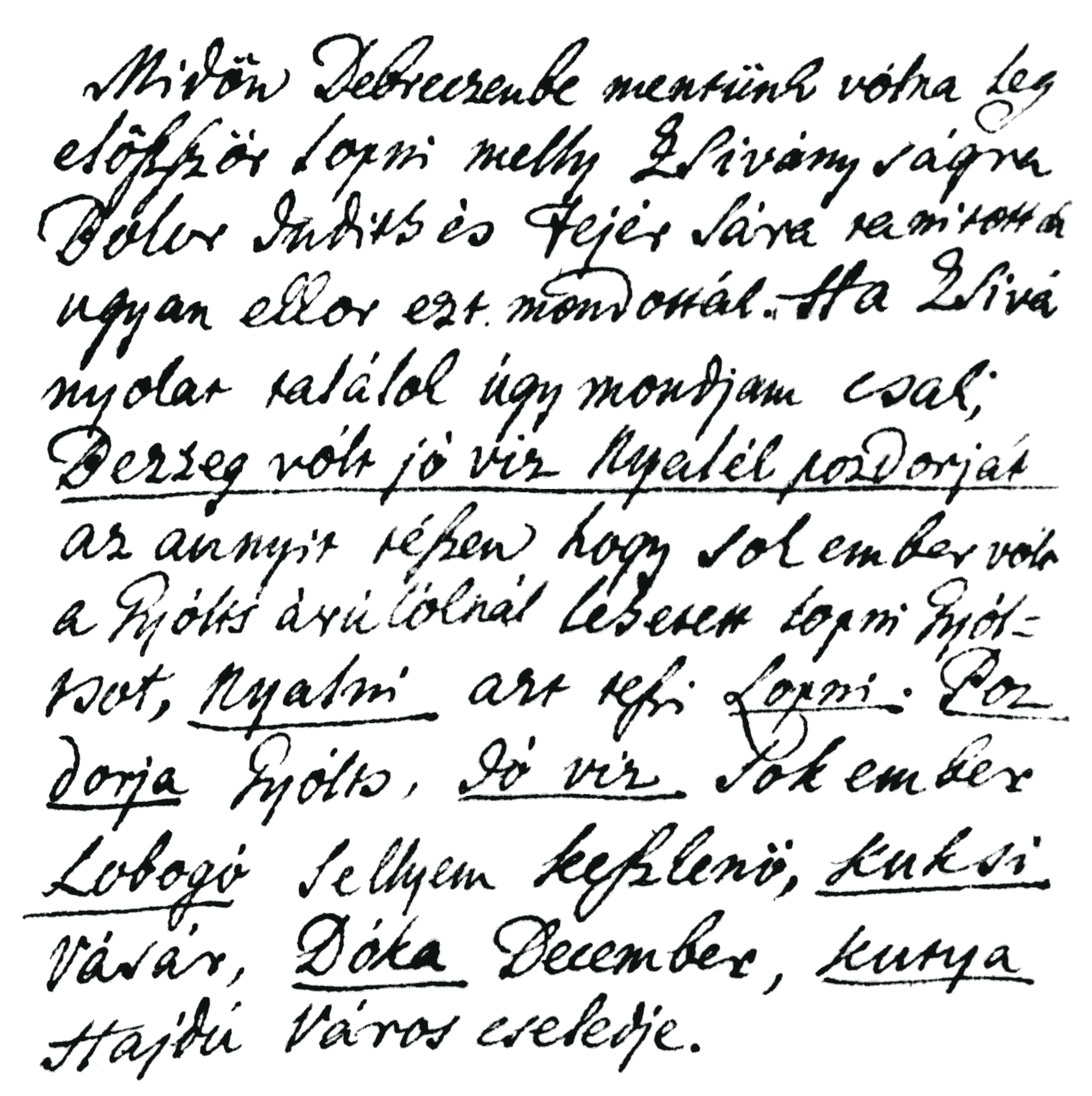 Cséplő Sára vallomása egy 1782-es bírósági jegyzőkönyvből